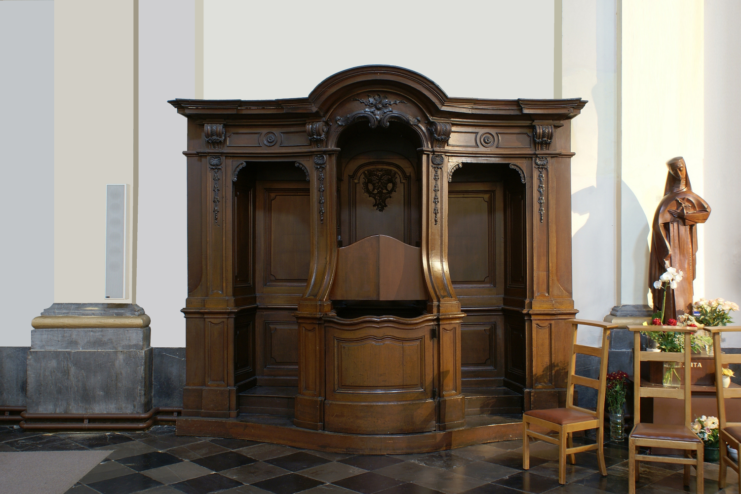 St-Antonius van Paduakerk te Charleroi - Biechtstoel herkomstig uit de Priorij van Oignies